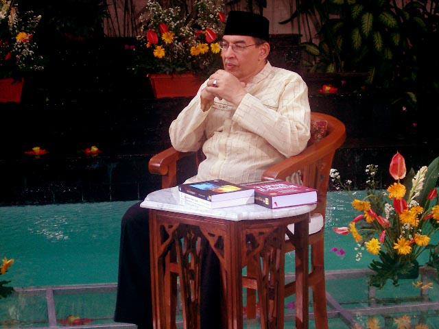 M. Quraish Shihab dalam rekaman Kultum di RCTI.